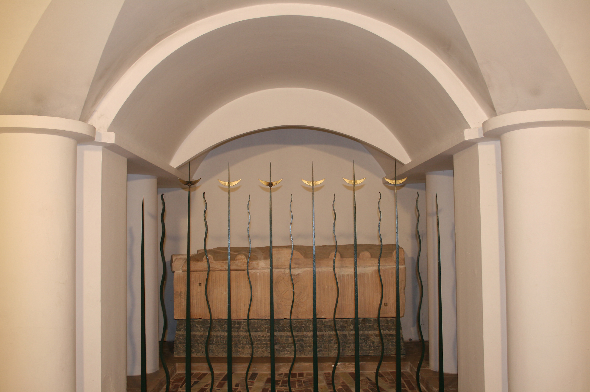 Calenzana France - ( Haute-Corse), église Sainte-Restitude - Sarcophage de (en marbre de Carrrare) de Sainte Restitude (1re moitié du IVe siècle).